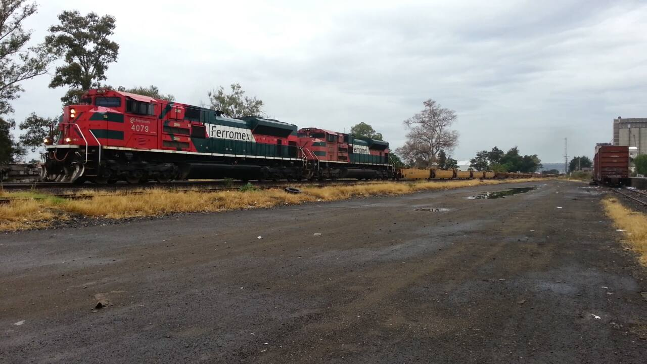 Ferromex 4079 & 4012 EMD SD70ACe